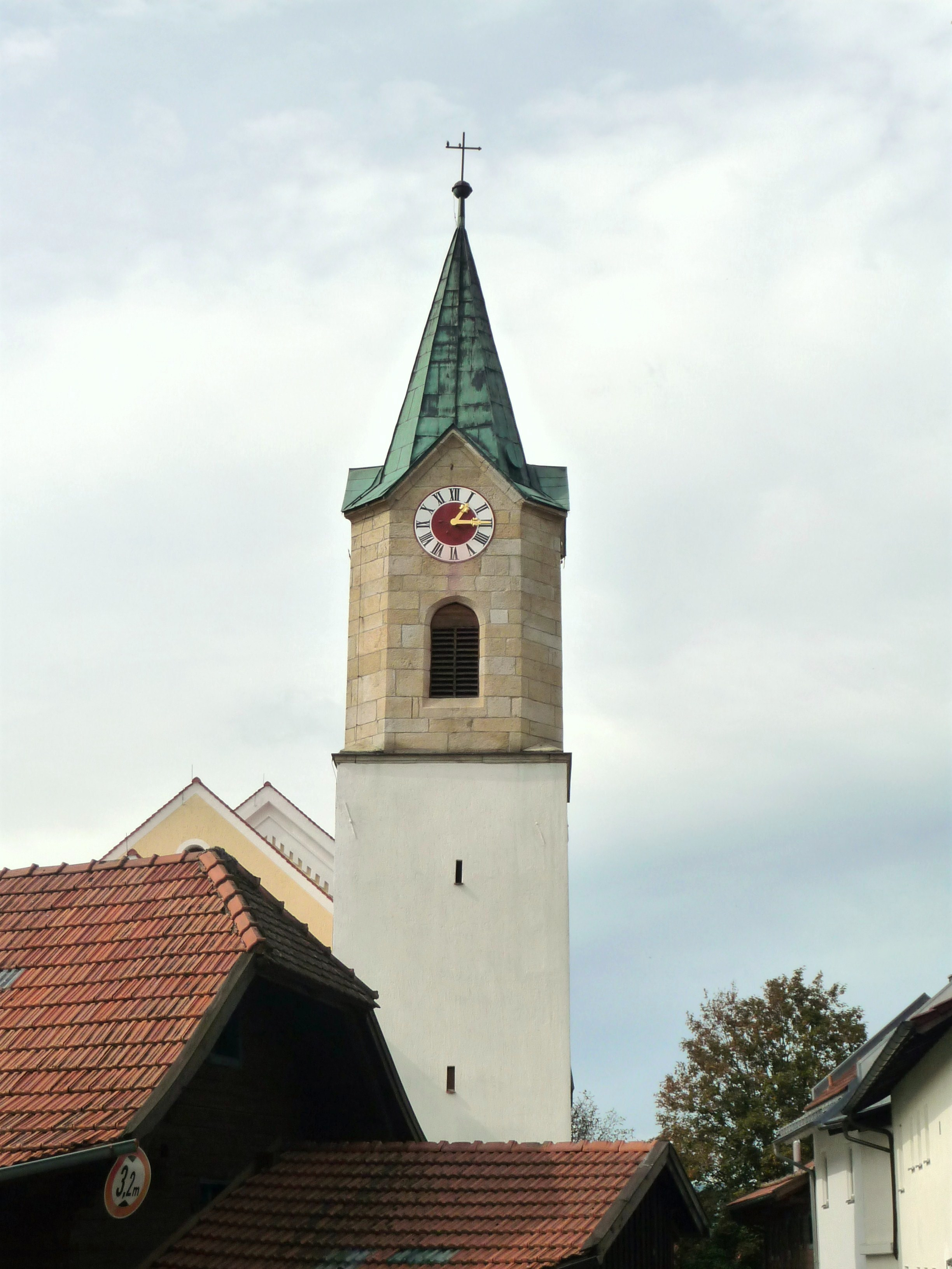 Die katholische Pfarrkirche St. Nikolaus in Rattenberg